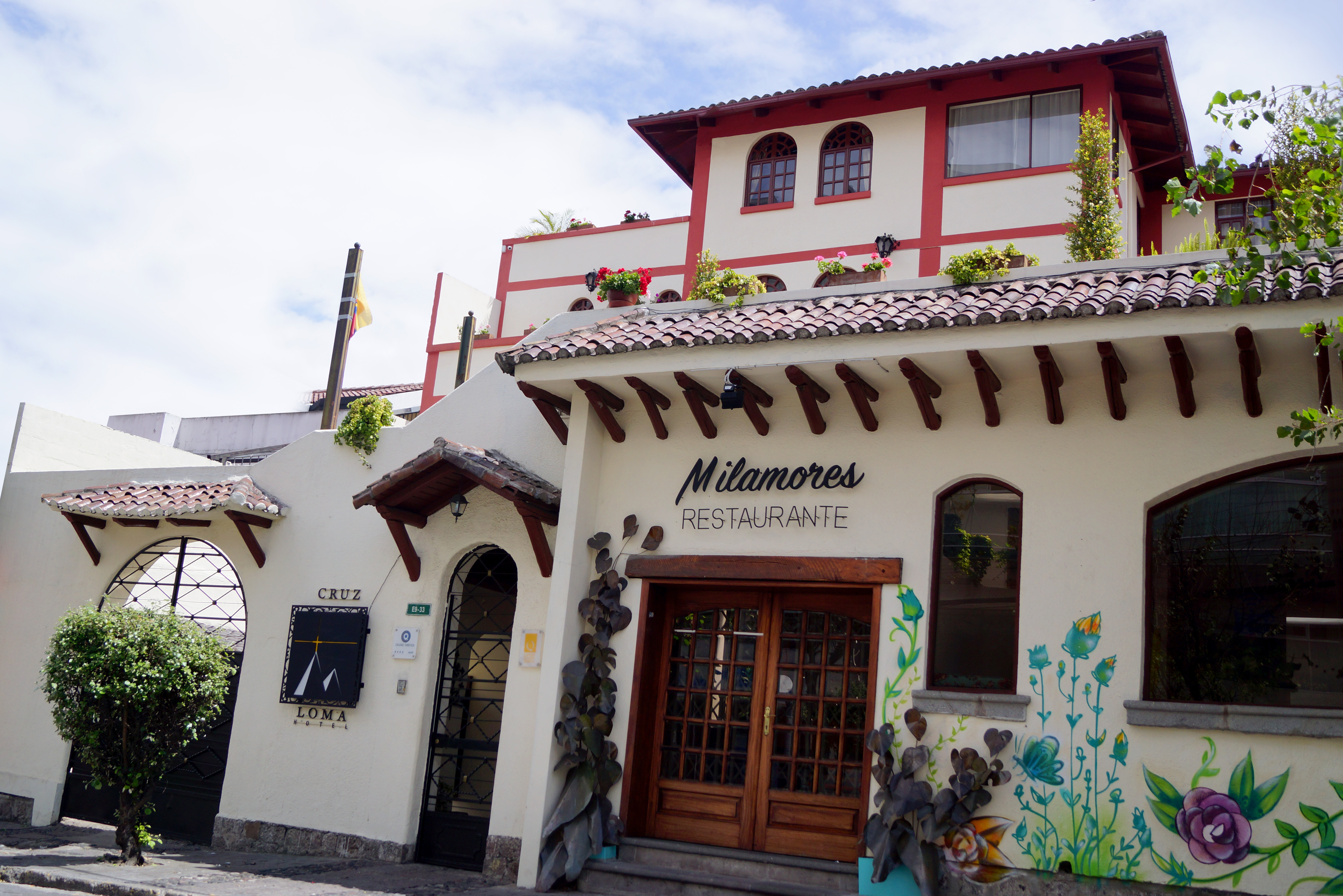 Fotografía de la entrada a Cruz Loma Hotel, ubicado en la Av. Ignacio de Veintimilla. Villa española con balcones que guarda el estilo de las casas de la Mariscal en el siglo XX.